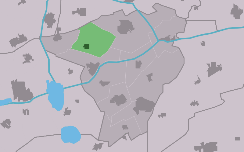 Kaartsje fan himrik fan Twizel